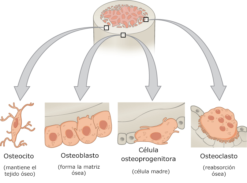 Esquema en el que se representan las principales células que forman el tejido óseo.